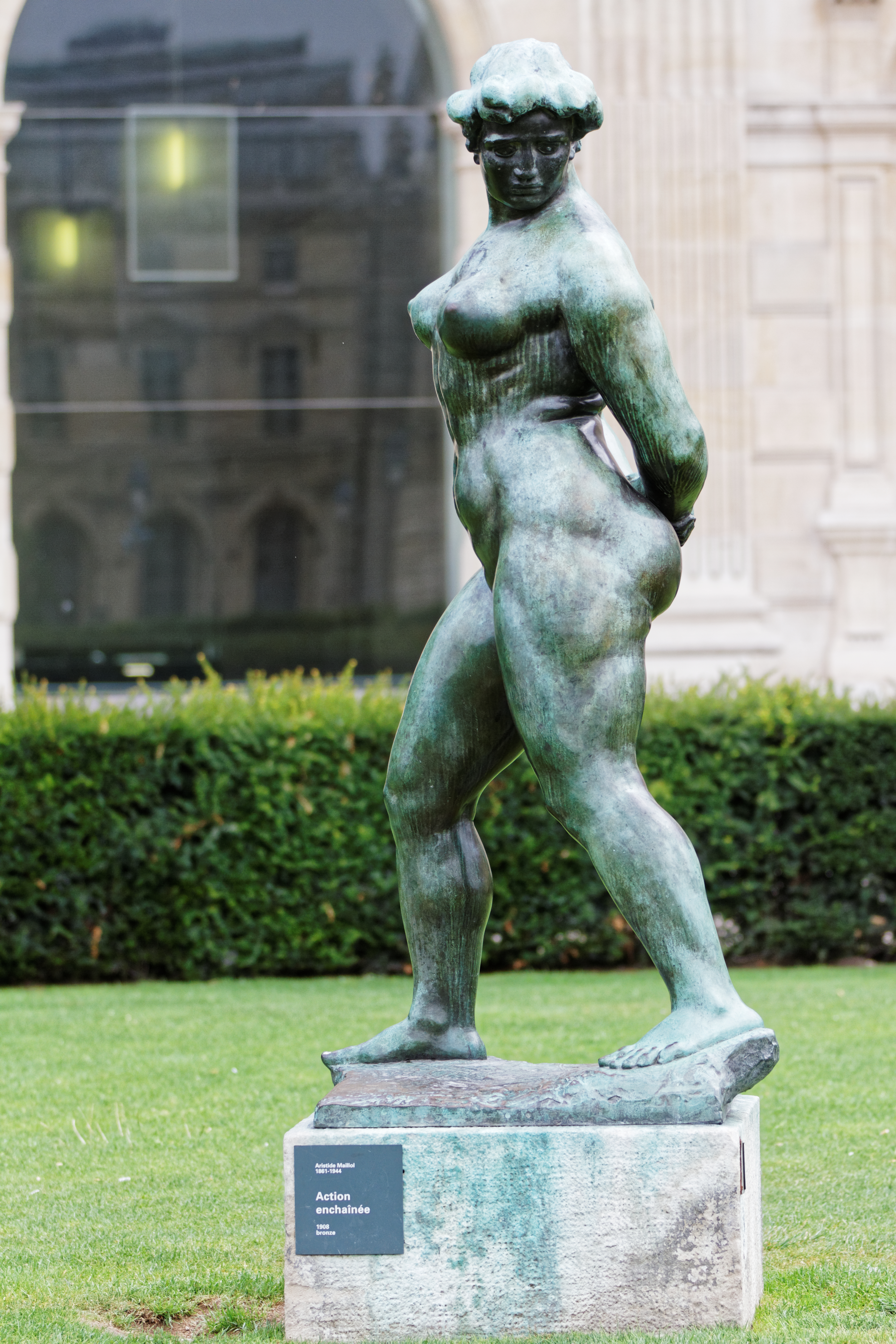 L'"Action enchaînée", statue d'Aristide Maillol installée dans le jardin des Tuileries à Paris.